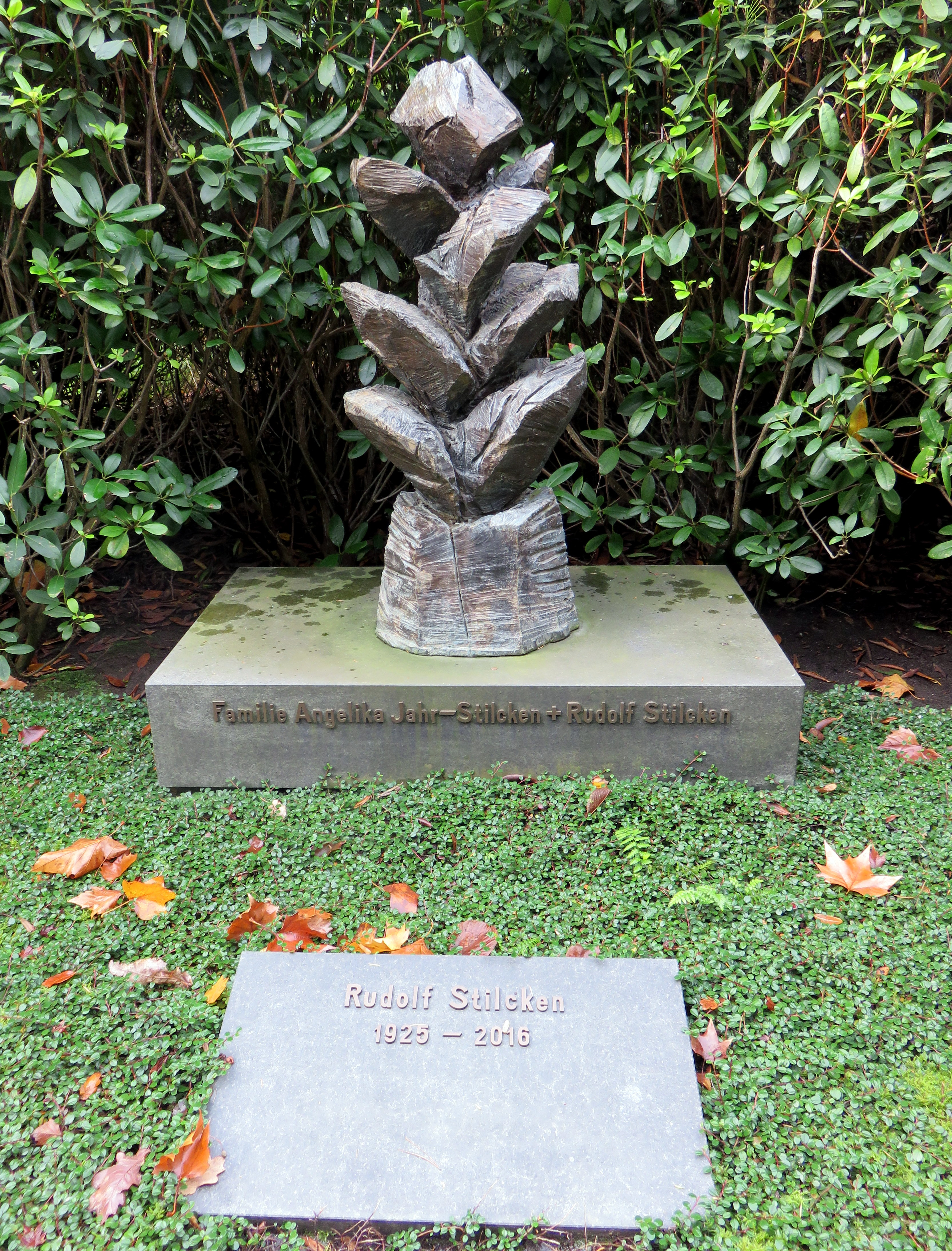 Familiengrabstätte Stilcken/Stilcken-Jahr, Friedhof Ohlsdorf, Planquadrat O 8 (nördlich Cordesallee gegenüber Südteich). Hier wurde der deutsche Unternehmer Rudolf Stilcken beerdigt, Ehemann der deutschen Journalistin und Unterneherin Angelika Jahr-Stilcken (Tochter des deutschen Verlegers John Jahr senior). Die Grabskulptur wurde 2010 vom deutschen Bildhauer Karl Manfred Rennertz geschaffen.